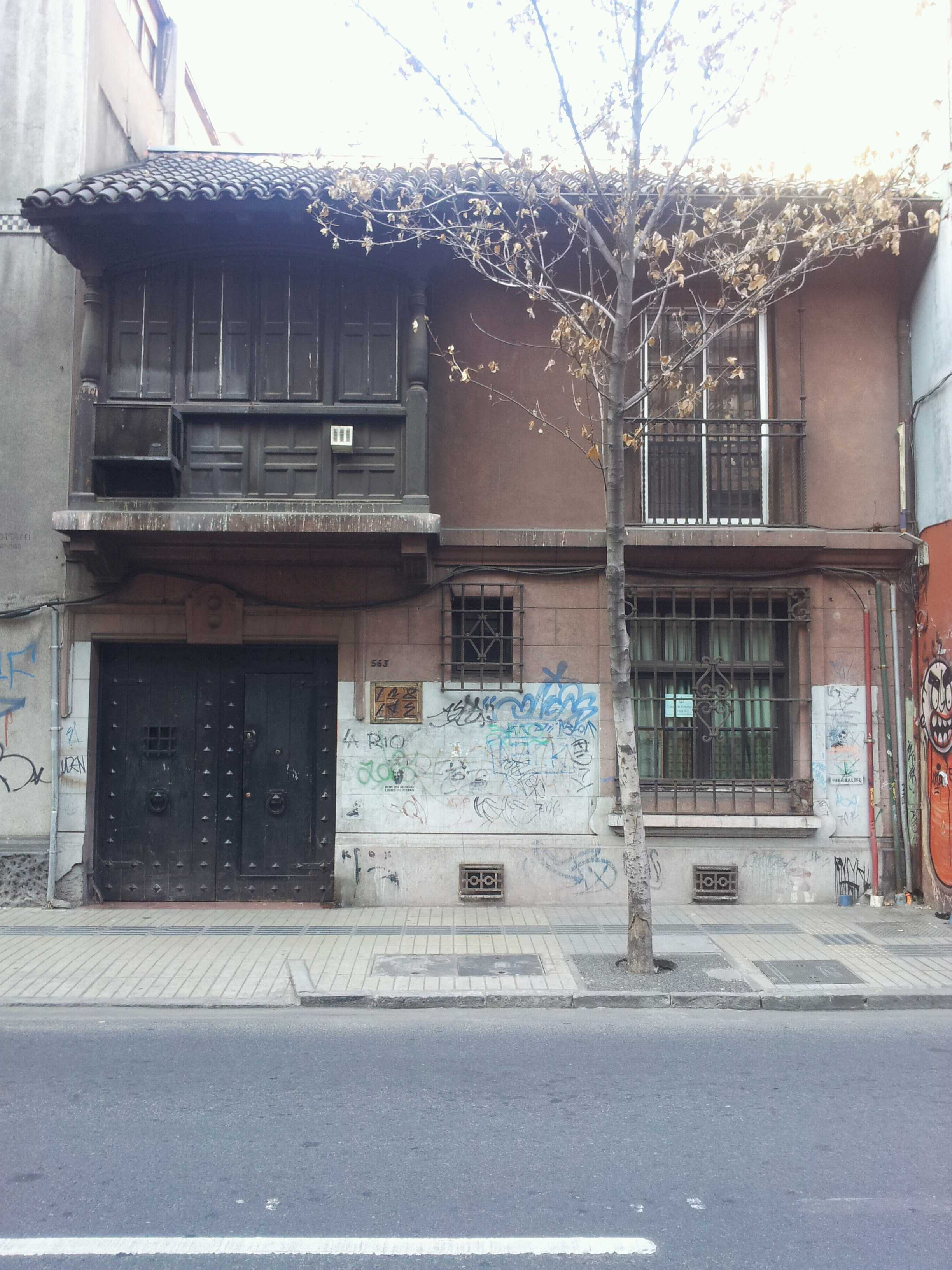 Edificio sede del Colegio de Enfermeras de Chile This is a photo of a national monument in Chile: 2102